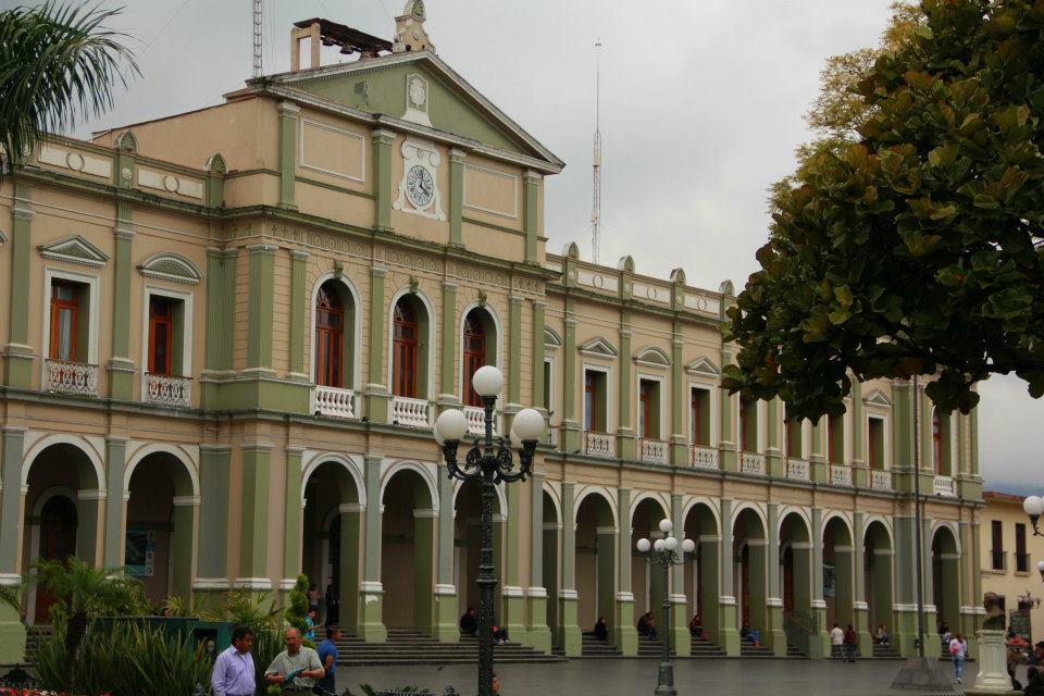 Palacio Municipal de Córdoba, Veracruz.